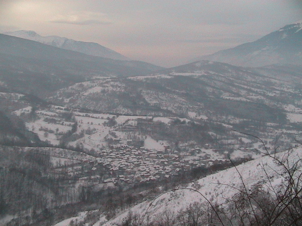 Selo Mlike